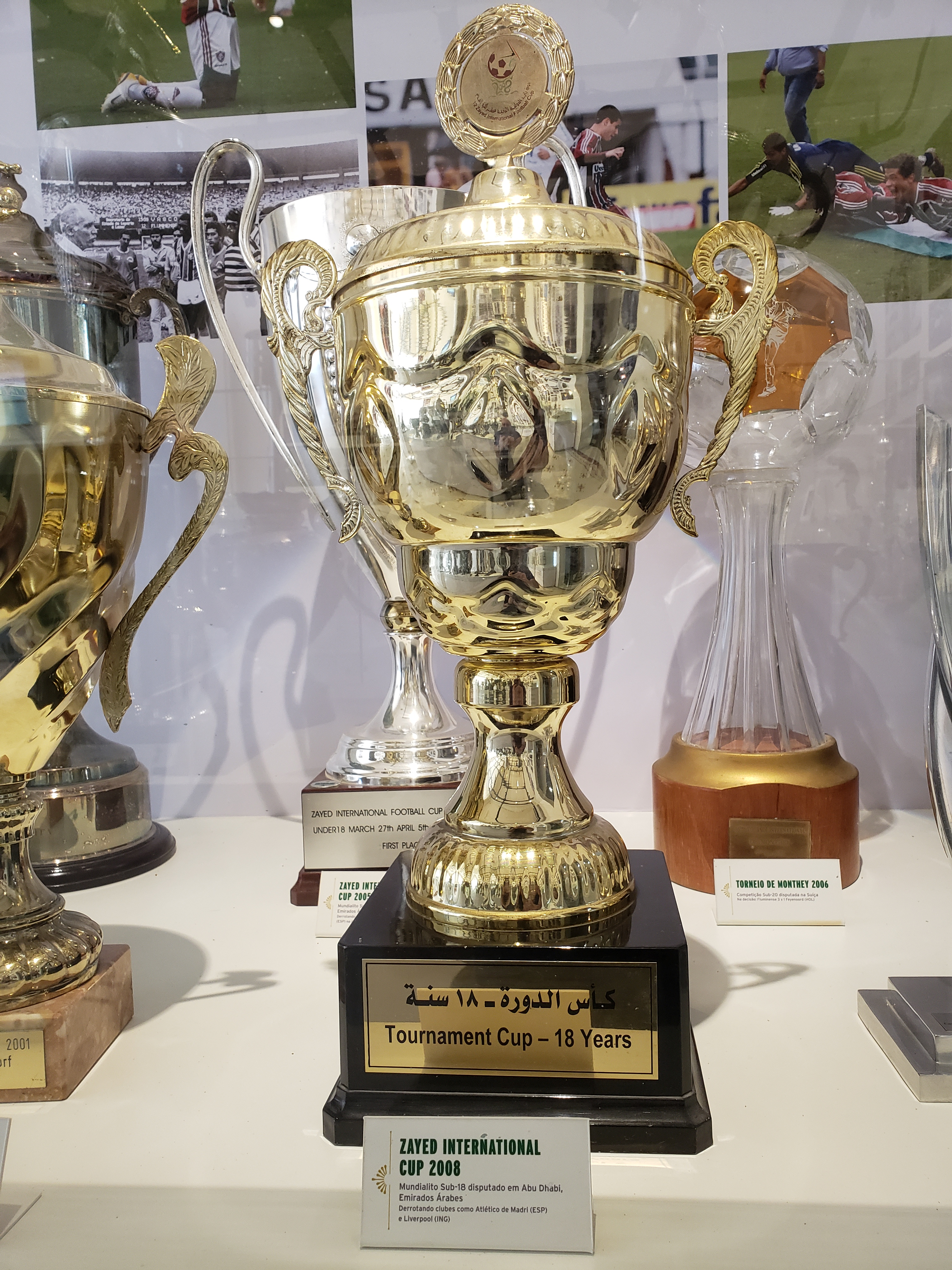 Zayed International Tournament U-19 2008 conquistado pelo Fluminense Football Club.